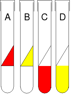 Résultats de l'incubation du milieu de Kligler-Hajna. A : Pente rouge, bactéries lactose - (ou avant incubation). B : Pente jaune, bactéries lactose +. C : Culot rouge, bactéries glucose - (ou avant incubation). D : Culot jaune, bactéries glucose +. Création personnelle (février 2006).